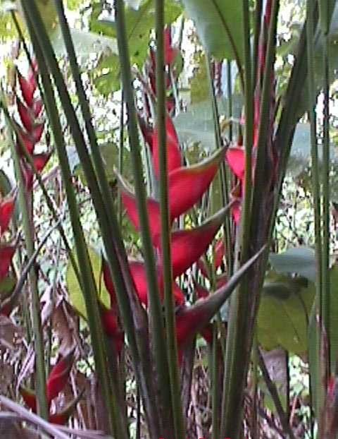 Vegetacion del Hatillo